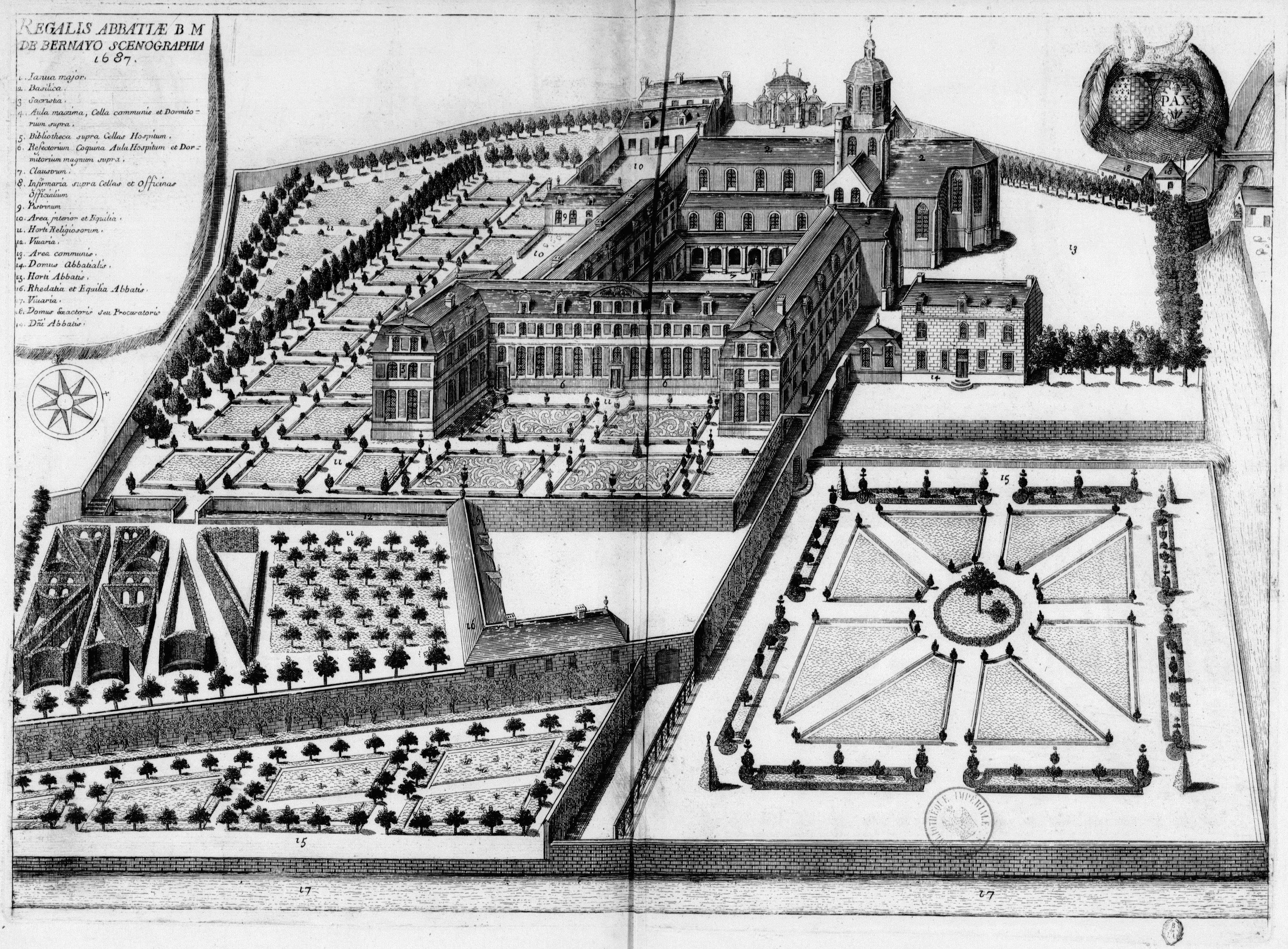 Planche gravée du 17ème siècle représentant l'abbaye Notre-Dame de Bernay, dans le livre Monasticon Gallicanum.